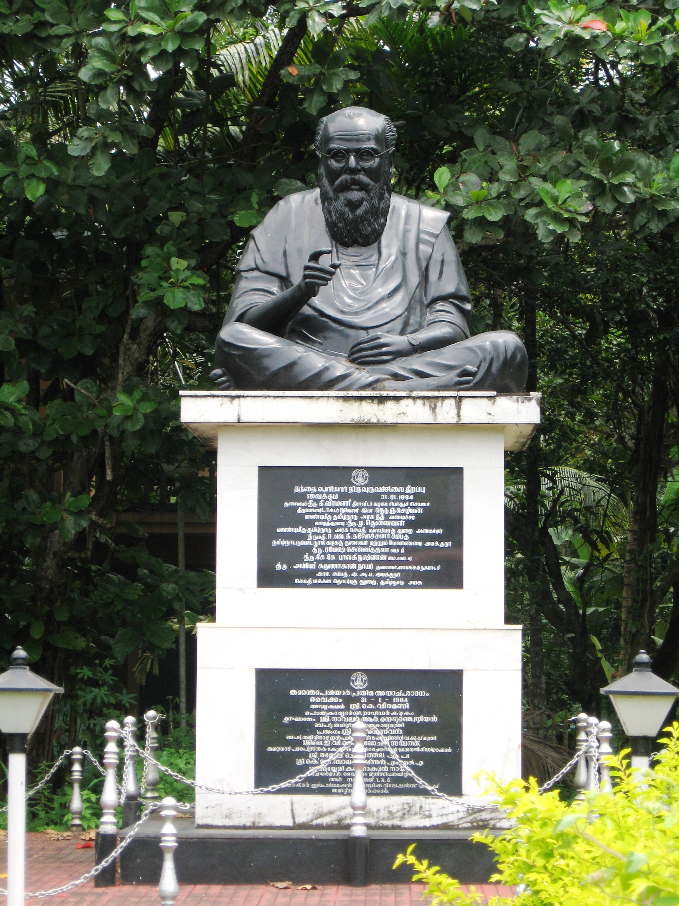 വൈക്കം നഗരമദ്ധ്യത്തിൽ ഇ.വി.ആറിന്റെ പ്രതിമ